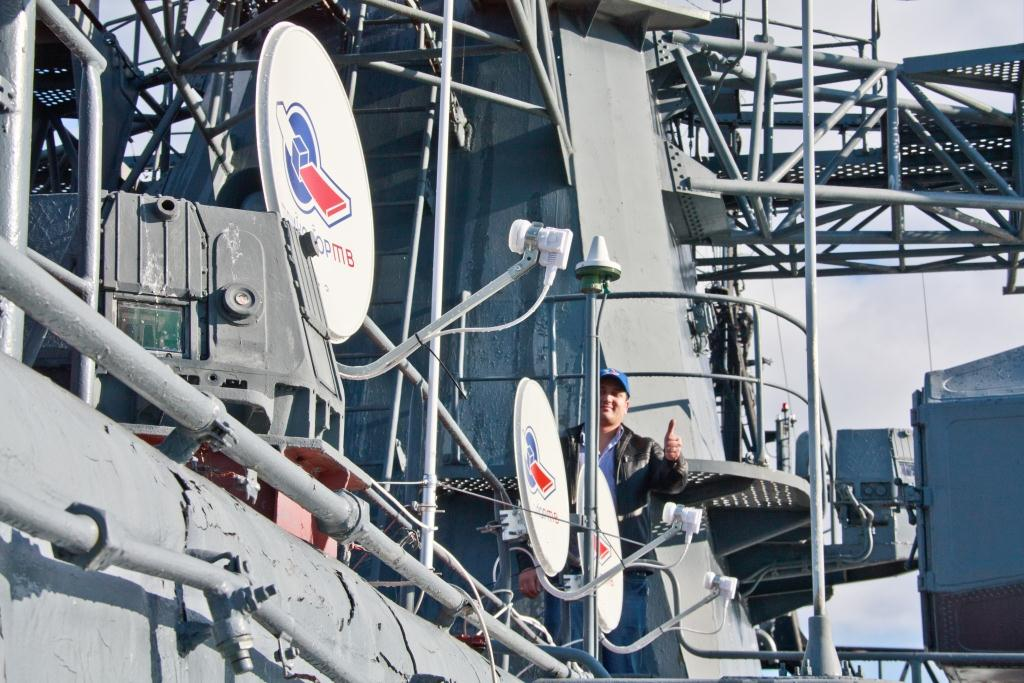 Благотворительность компании ЗАО "Национальная спутниковая компания", установка оборудования "Триколор ТВ" на борт эсминца Балтийского флота Беспокойный